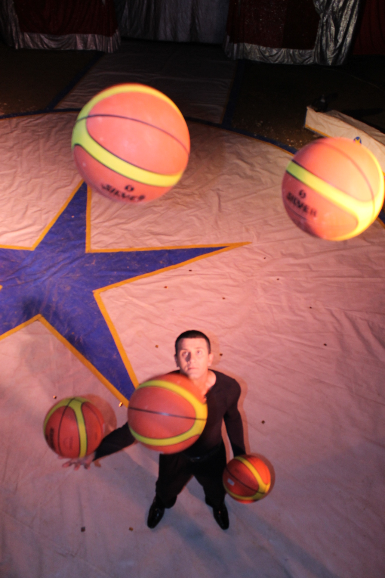 5 Balones de Baloncesto, Pedro Elis 2013